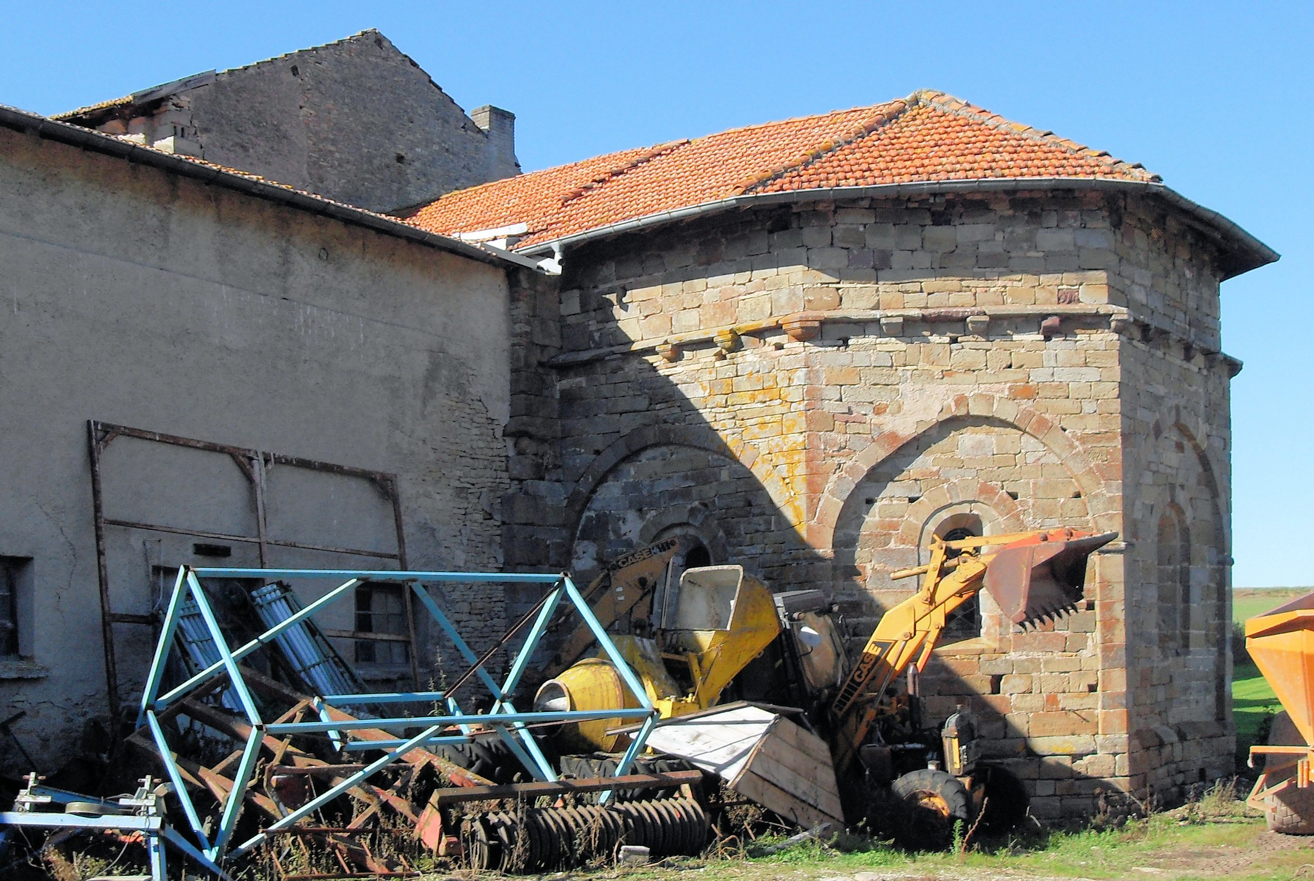 La chapelle Saint-Jean-Baptiste, Ferme de Xugney, commune de Rugney, ancienne commanderie de l'ordre du Temple (templiers) puis de l'ordre de Saint-Jean de Jérusalem (hospitaliers).